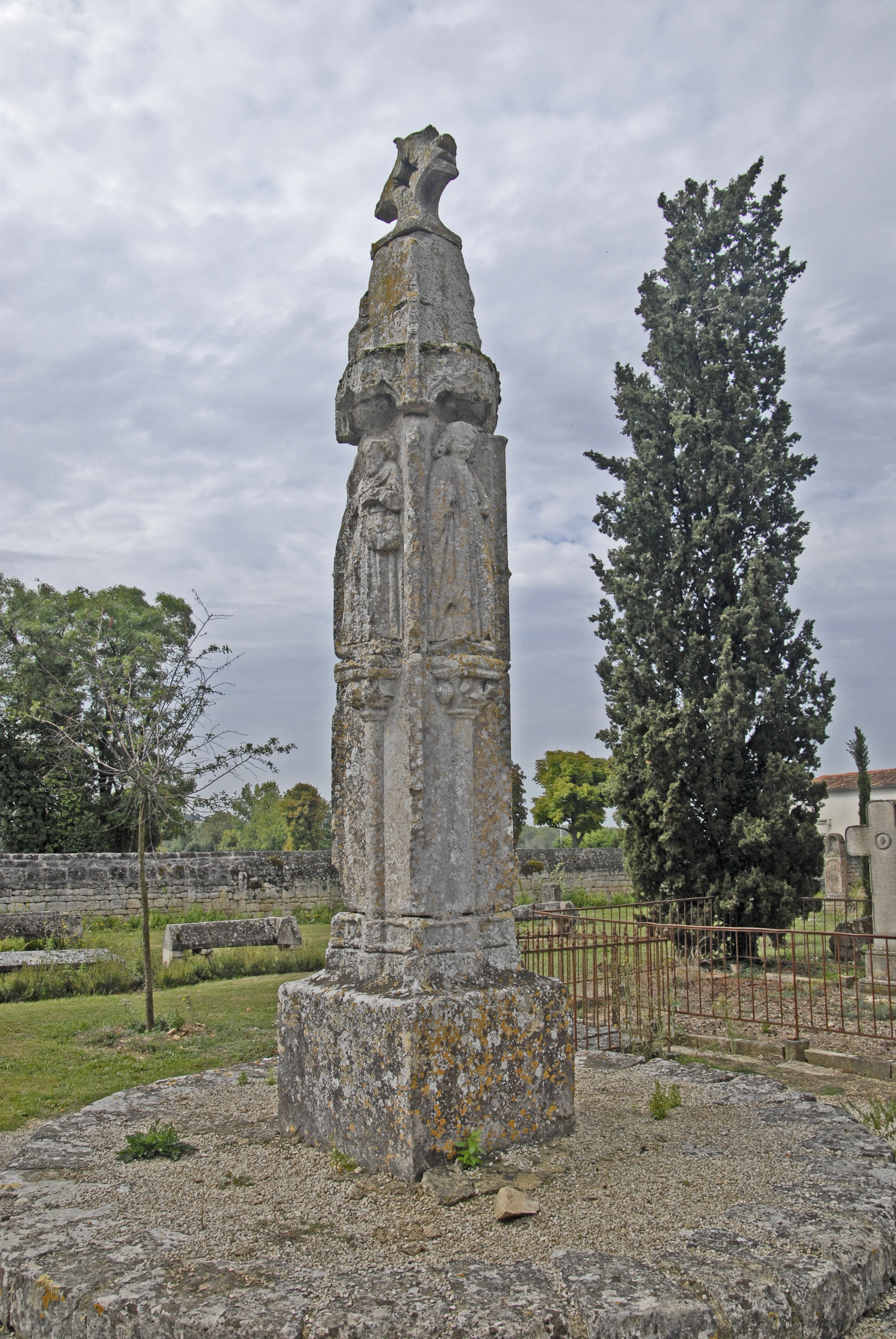 St-Pierre d'Aulnay,Friedhof, Bildstock